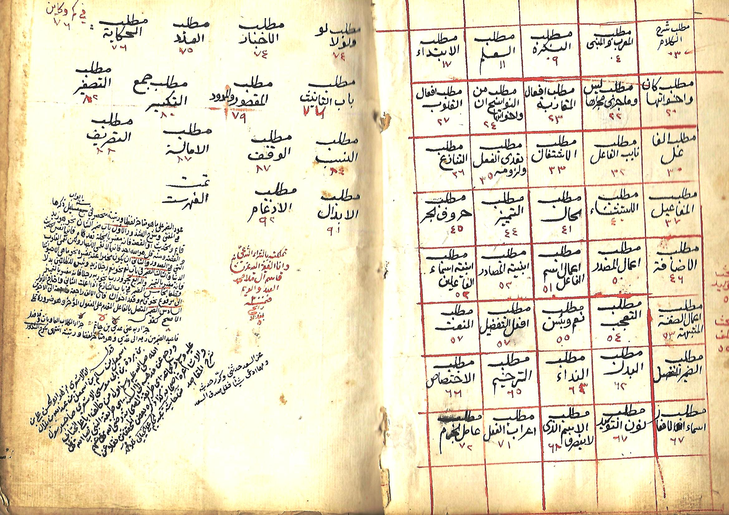 غلاف مخطوط شرح ألفية ابن مالك في النحو وهي من تأليف الشيخ محمد بن عبد الله بن مالك الطائي الجياني المعروف بـابن مالك والمخطوط كتبه أحمد الجريسي المعروف بالصغير ولقد نسخه بيدهِ في 27 من شهر ذي القعدة عام 1175 هـ/1762م، ثم اشتراه الشيخ قاسم أفندي المفتي من سوق بغداد بثمن 300 قرش كما أشار بذلك على غلاف المخطوط